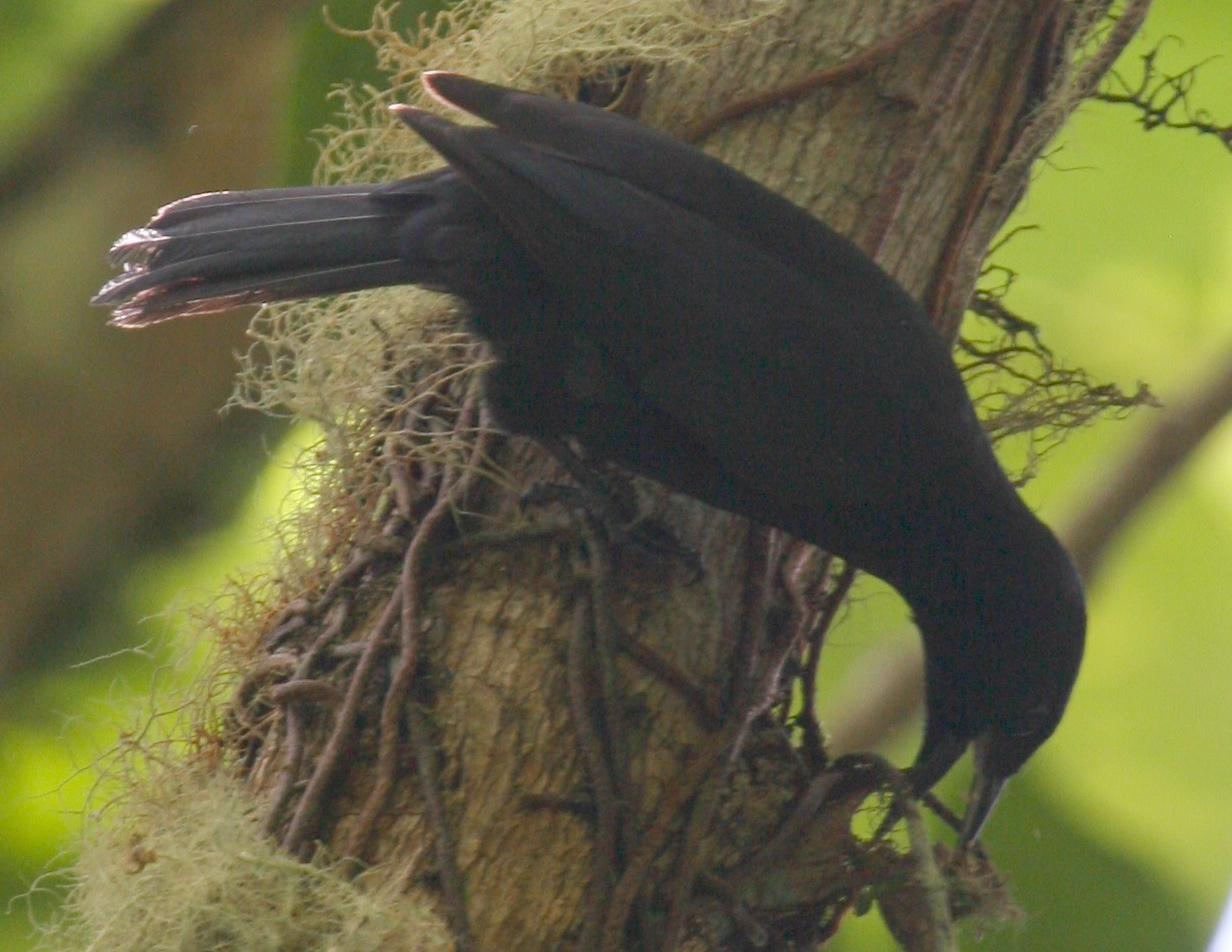 Nesopsar nigerrimus